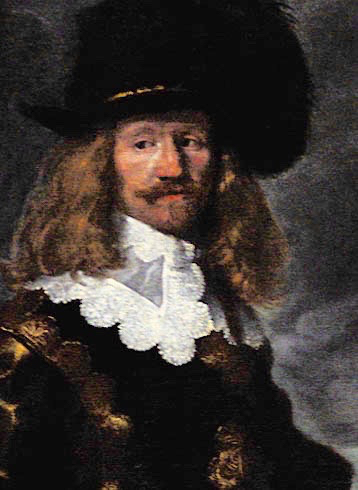 Hans Ulrik Gyldenløve (1615-1645), son of king Christian IV and Karen Andersdatterdetail